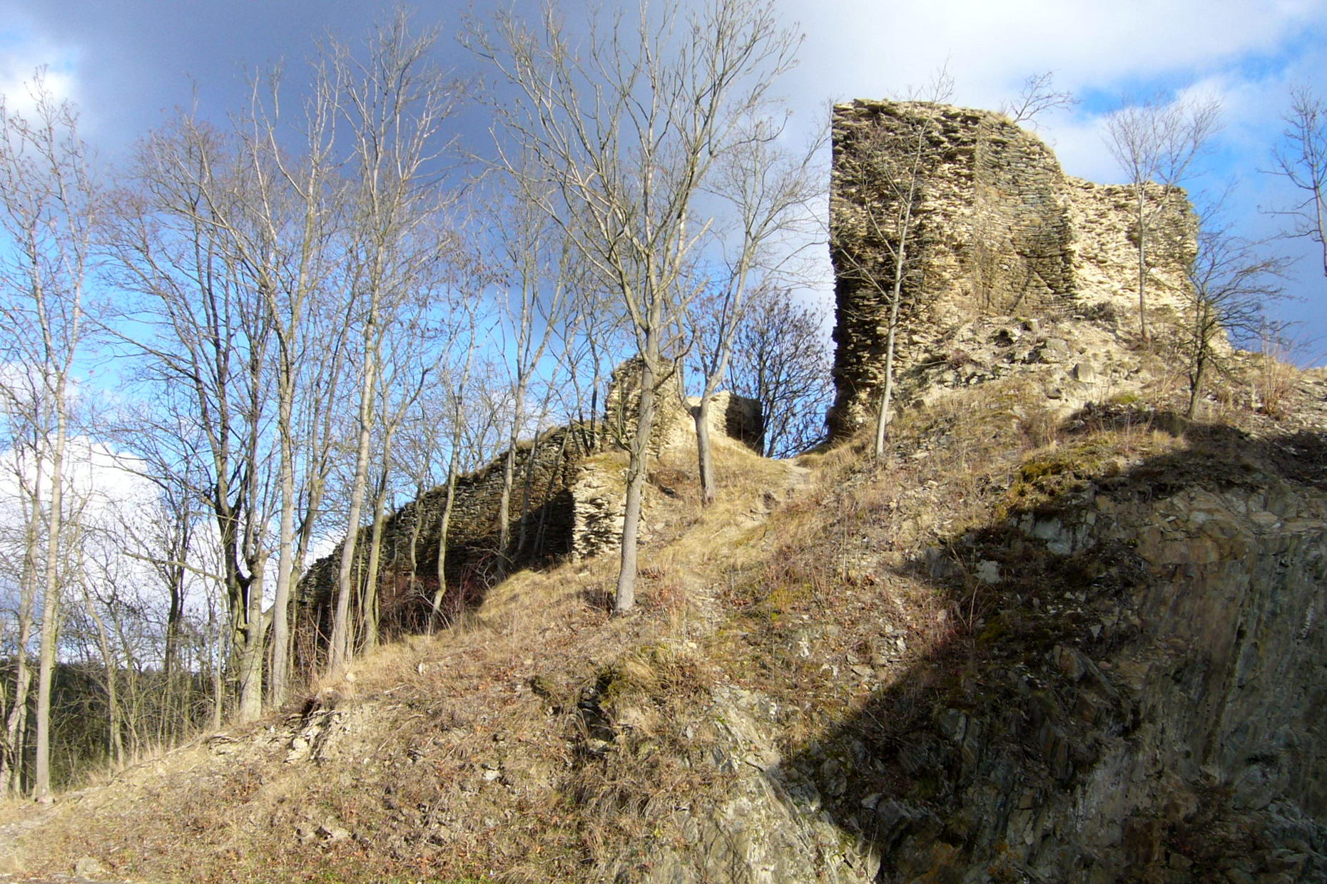 Rabštejn nad Střelou - torzo věže v čele hradu (pohled z cesty podél klášterní budovy)